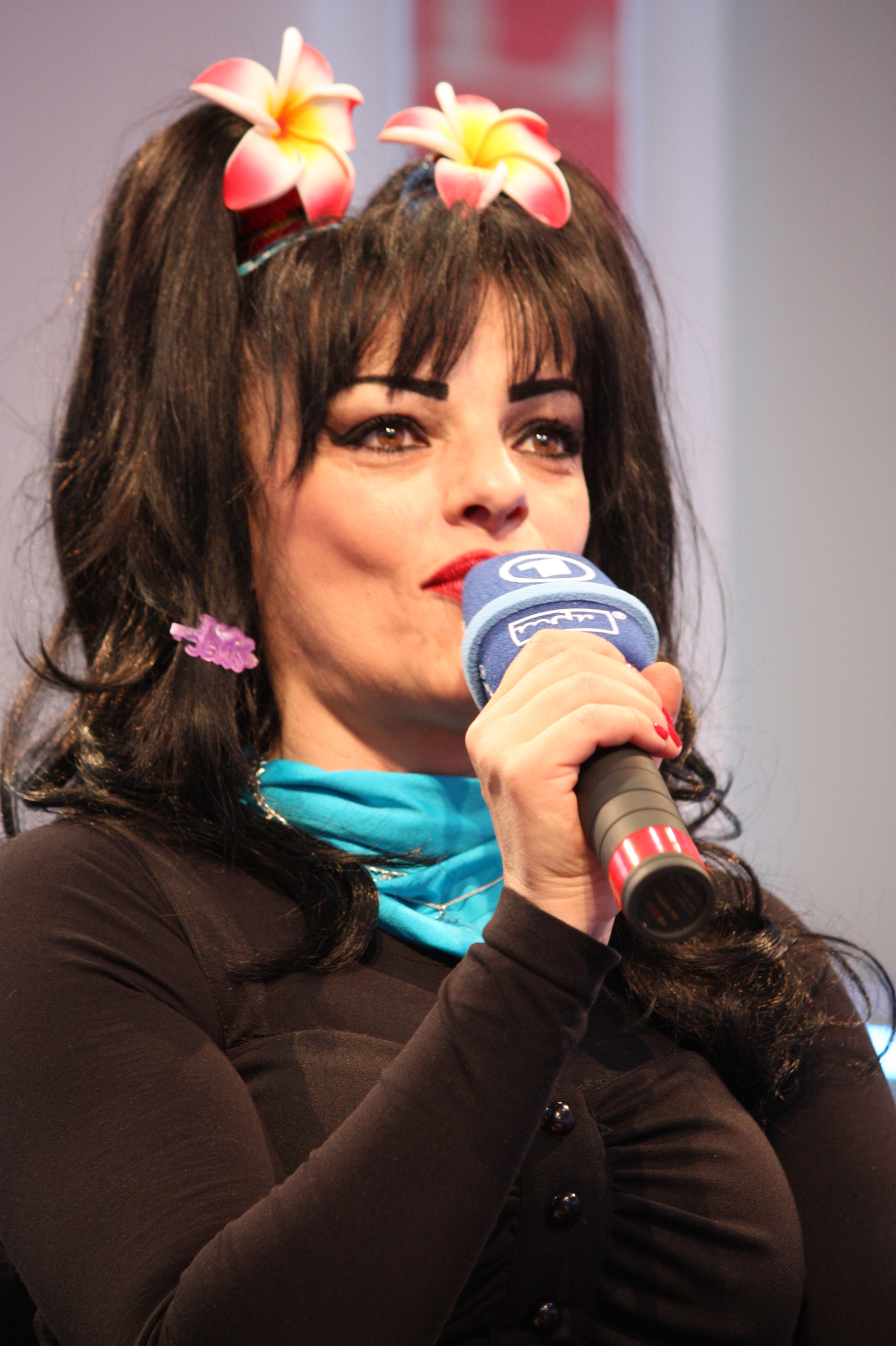 Nina Hagen auf der Leipziger Buchmesse im März 2010.